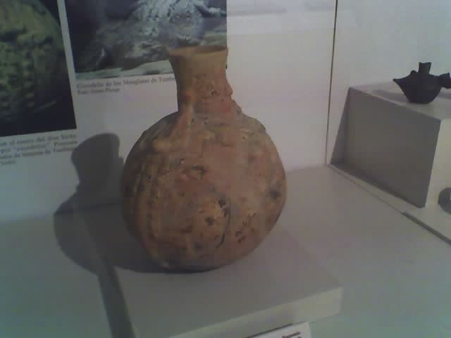 Cántaro con rostro divino (Museo Sicán).